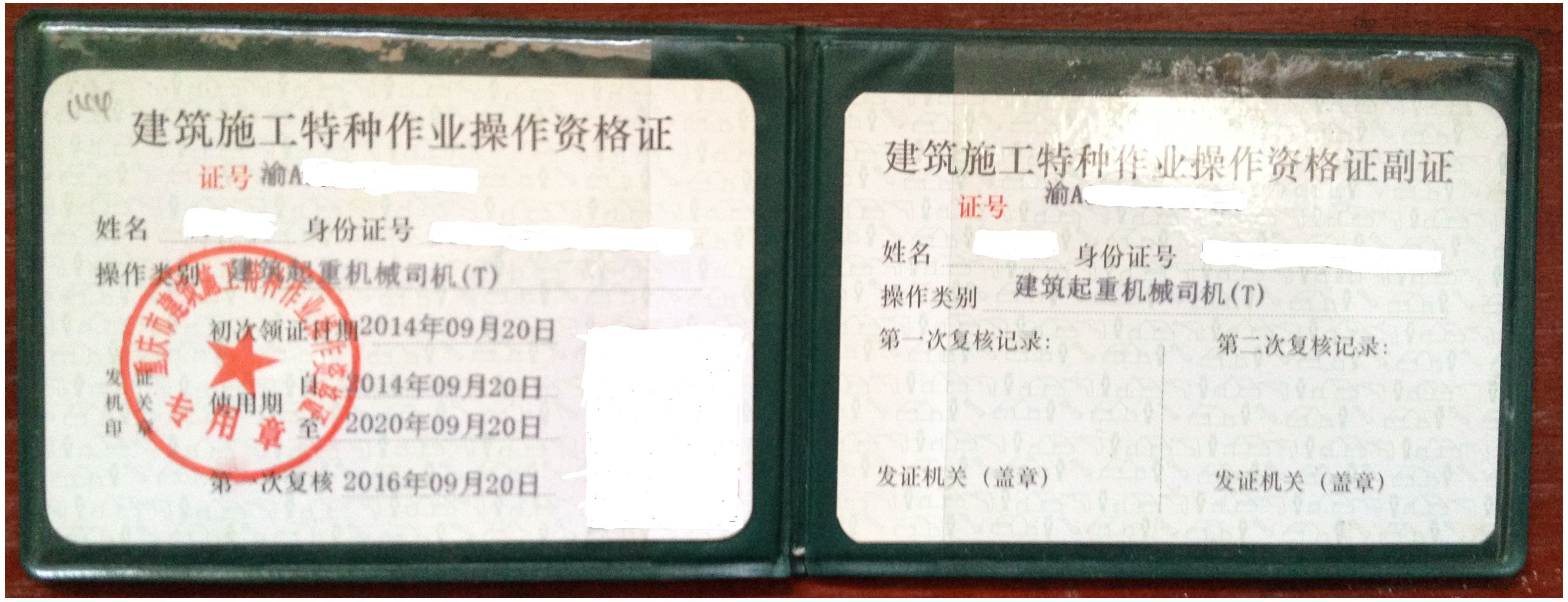 这是我自己的作品，我授权维基百科使用。